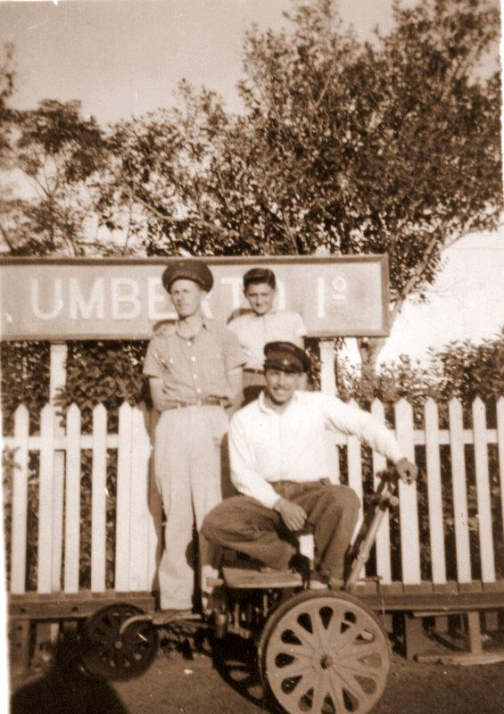 Trabajadores ferroviaros en la estación de Humberto Primo, Santa Fe, Argentina